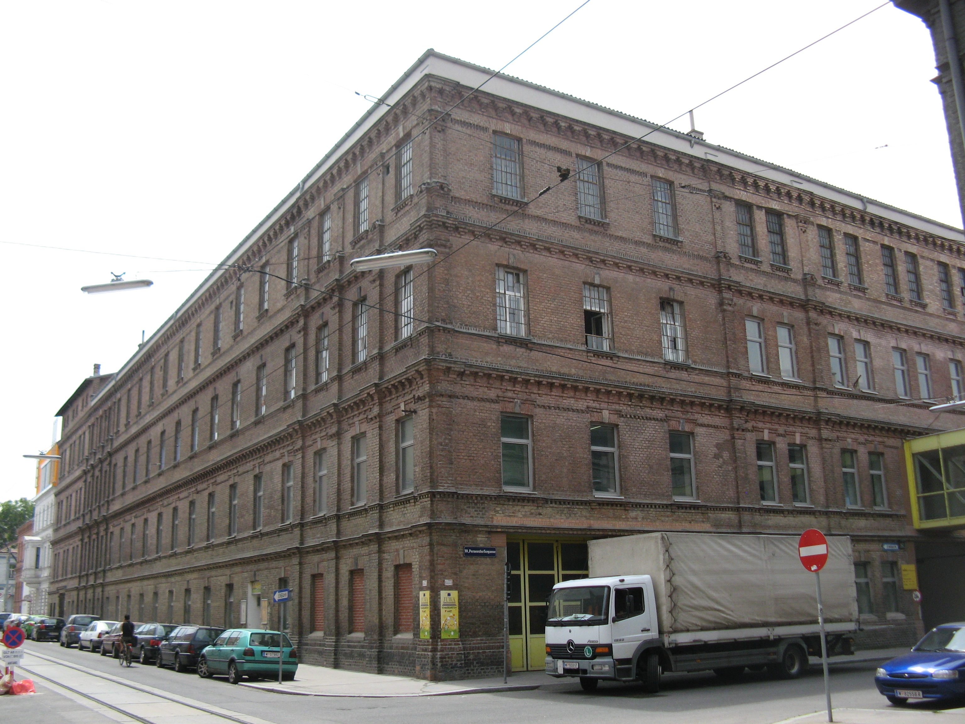 Fabriksgebäude (1898) von Carl Langhammer, Pernerstorfergasse 57, Wien-Favoriten